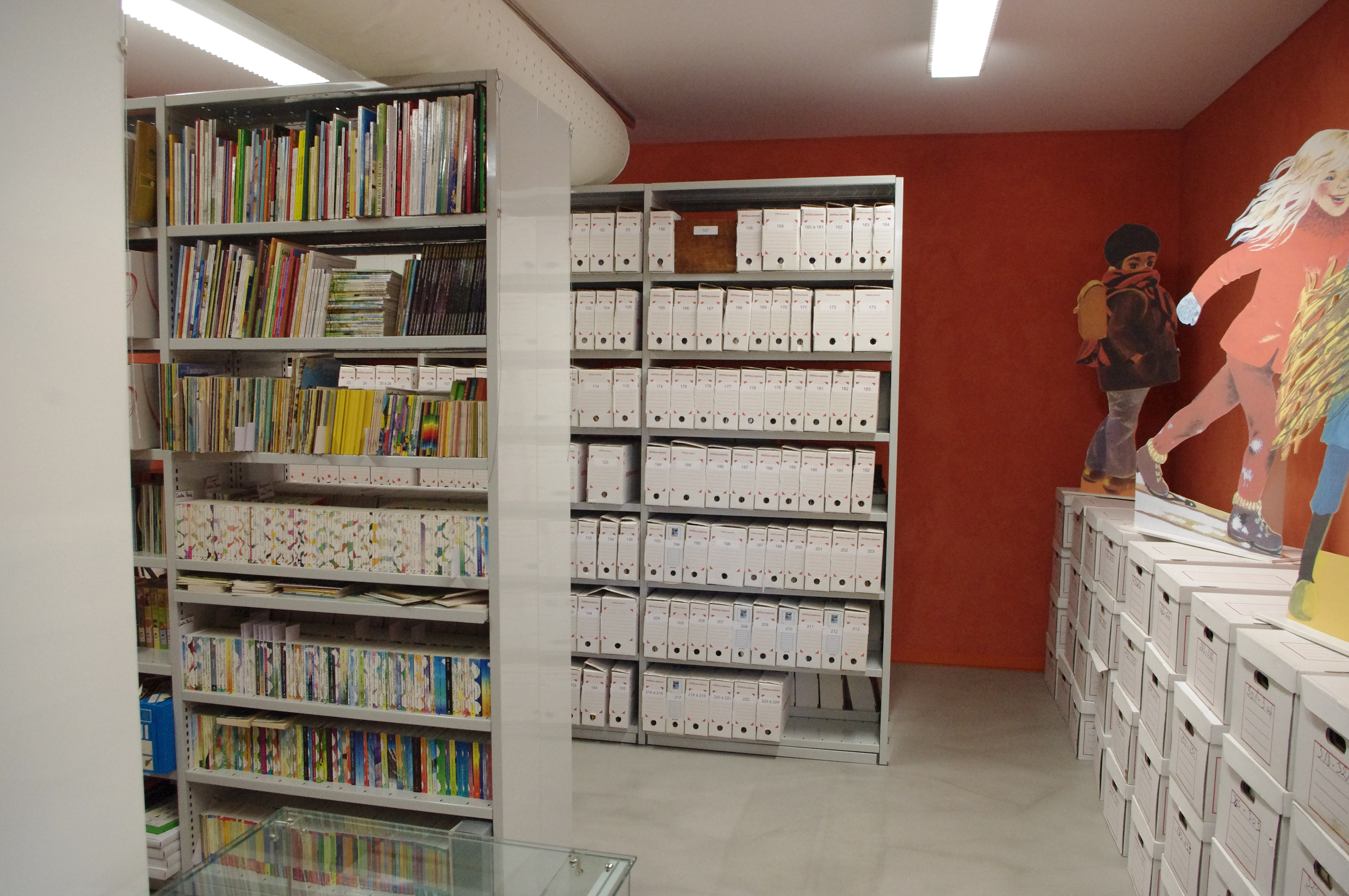 Meuzac 2012 seminaire pere castor IMGP3771 – Archives